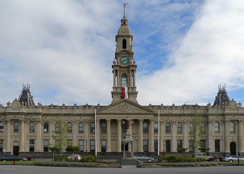 L'hotel de ville de melbourne